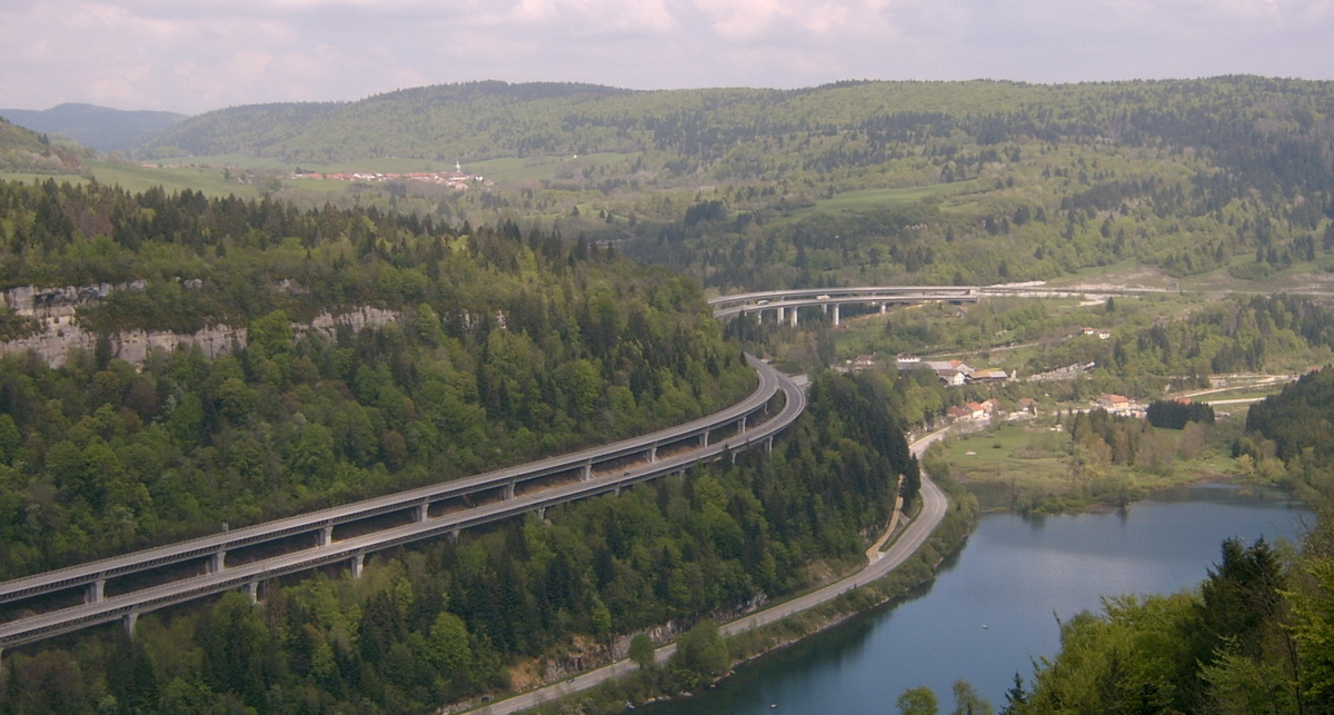 Photo personnelle du viaduc de Sylans qui fait partie de l'Autoroute française A40 (APRR). Ce viaduc passe au dessus du lac de Sylans et contourne le village "Moulin de Charix" English translation: Personally made photo of viaduc de Sylans which is part of French motorway A40. The bridge passes on top of the lake lac de Sylans and goes around the village "Moulin de Charix".